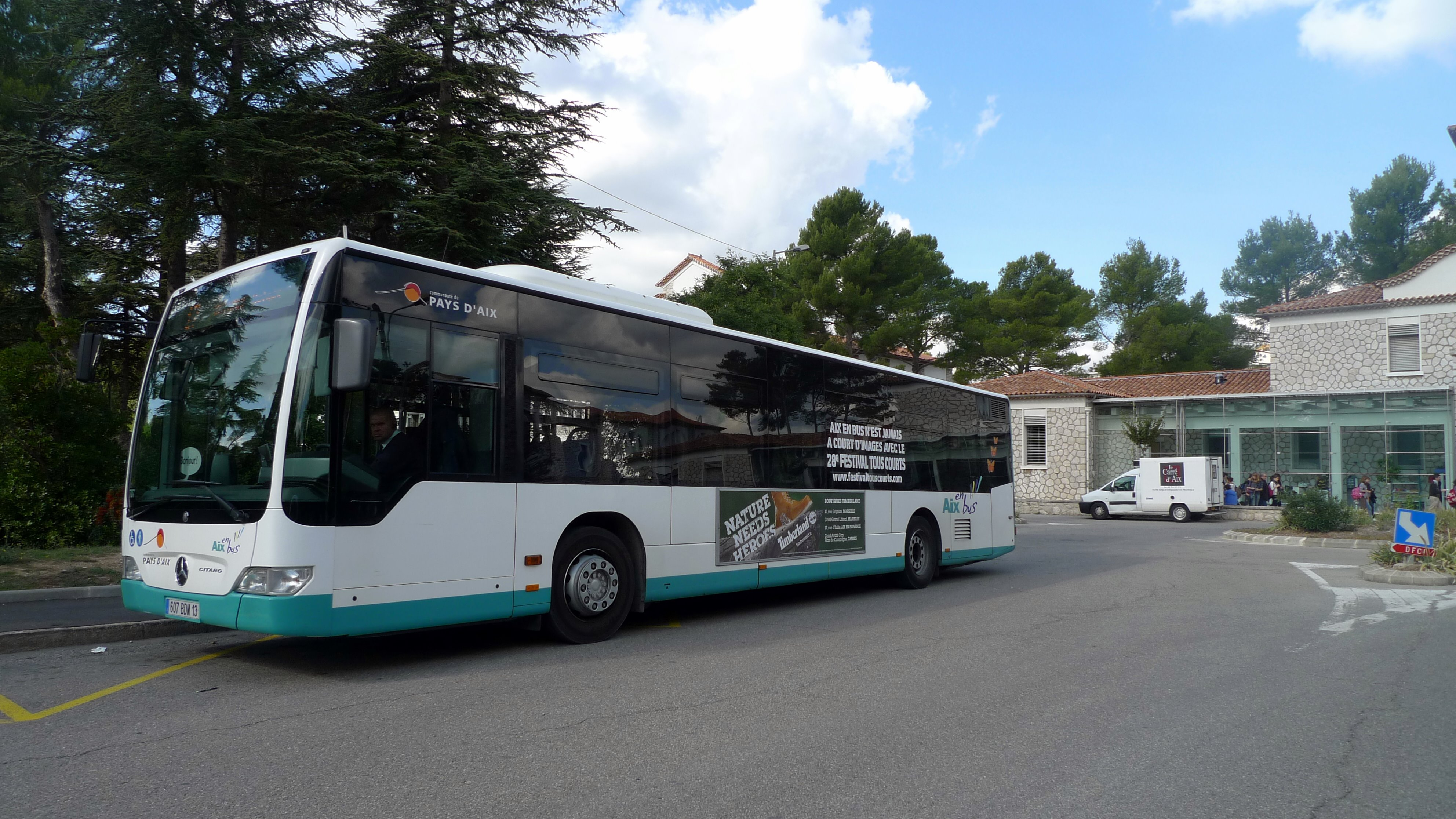 Le Technopôle de l'Arbois est un lieu de concentration et de rayonnement des acteurs scientifiques, académiques et économiques travaillant dans le domaine de l'environnement et du développement soutenable. L'enjeu d'une telle implantation est de s'intégrer dans un réseau de compétences axées sur les innovations technologiques et de procédés.